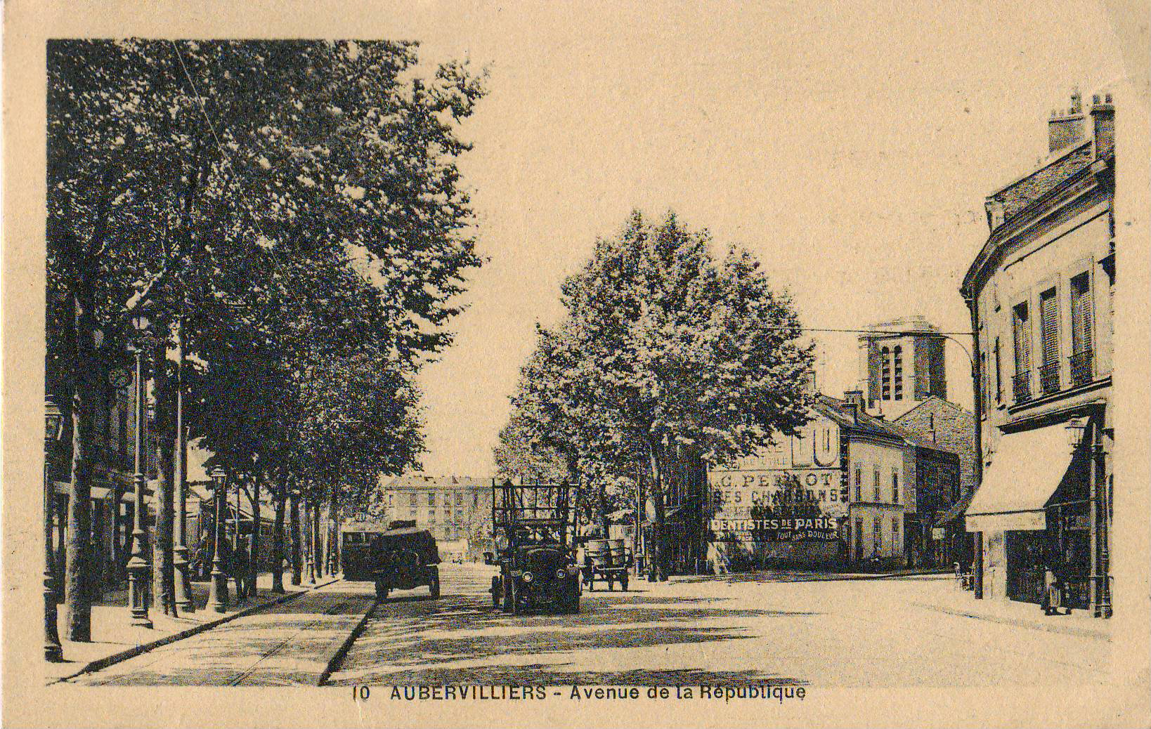 Carte postale ancienne éditée par Levy, n°10 :AUBERVILLIERS - Abenue de la République